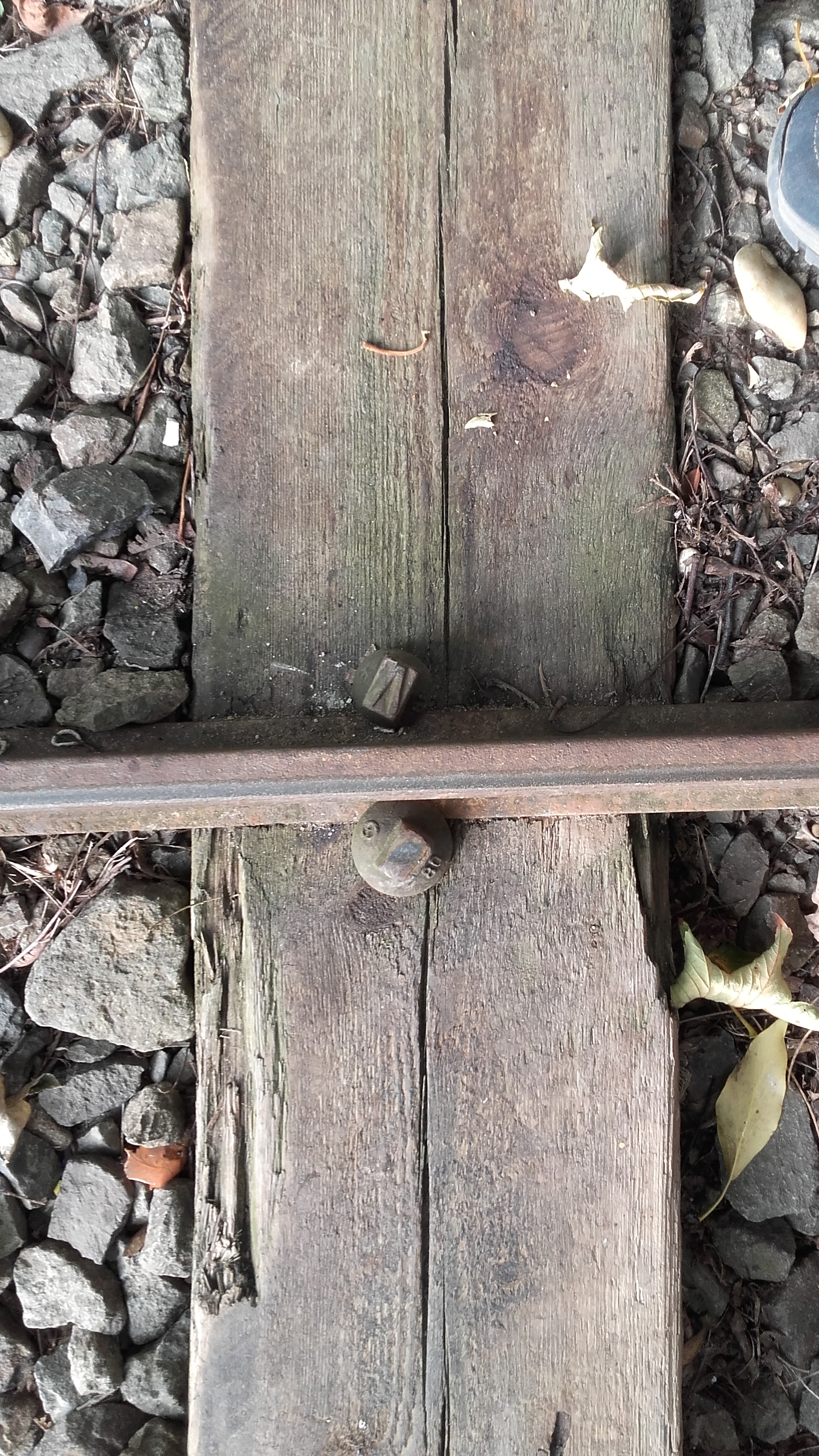 A pálya egyik sínleerősítése a kinti oldalon "V" jelű síncsavarral a belső oldalt pedig "H" jelű síncsavarral. A képen jól megfigyelhető, hogy a belső oldali síncsavarnak a feje le van vágva, erre azért van szükség, mert a 9 kg/fm rendszerűnél kisebb sínek esetén a csavar nagyon kilóg és a jármű kerekének nyomkarimája felütközik benne.